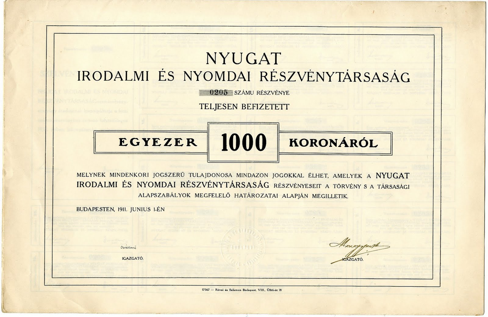 A Nyugat kiadója - Láng József Ady-kutató közlése szerint - 110, egyenként ezer korona névértékű részvényt bocsátott ki. A képen egy részvény látható a 110-ből.